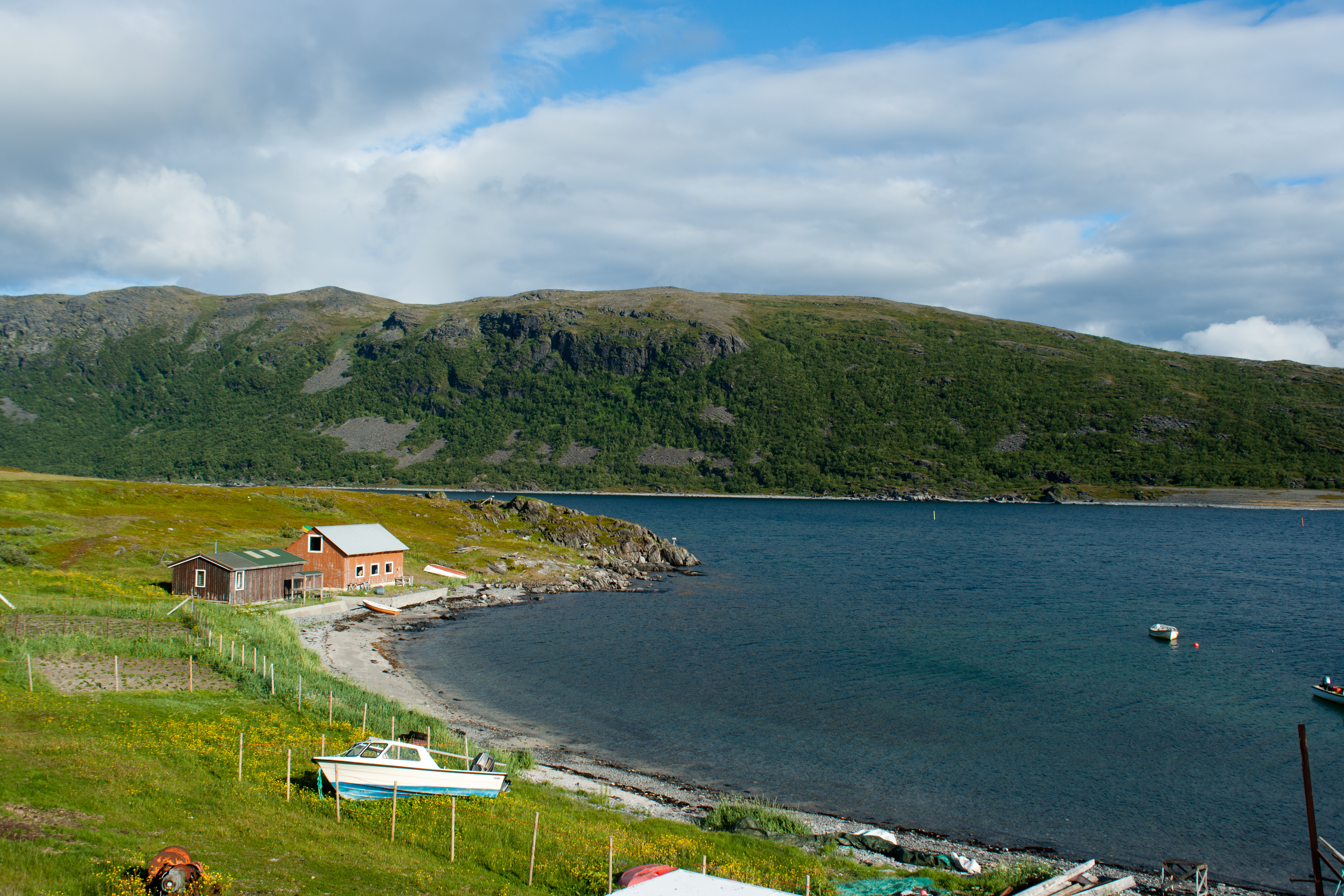 Kistrand, Porsanger, Norway.